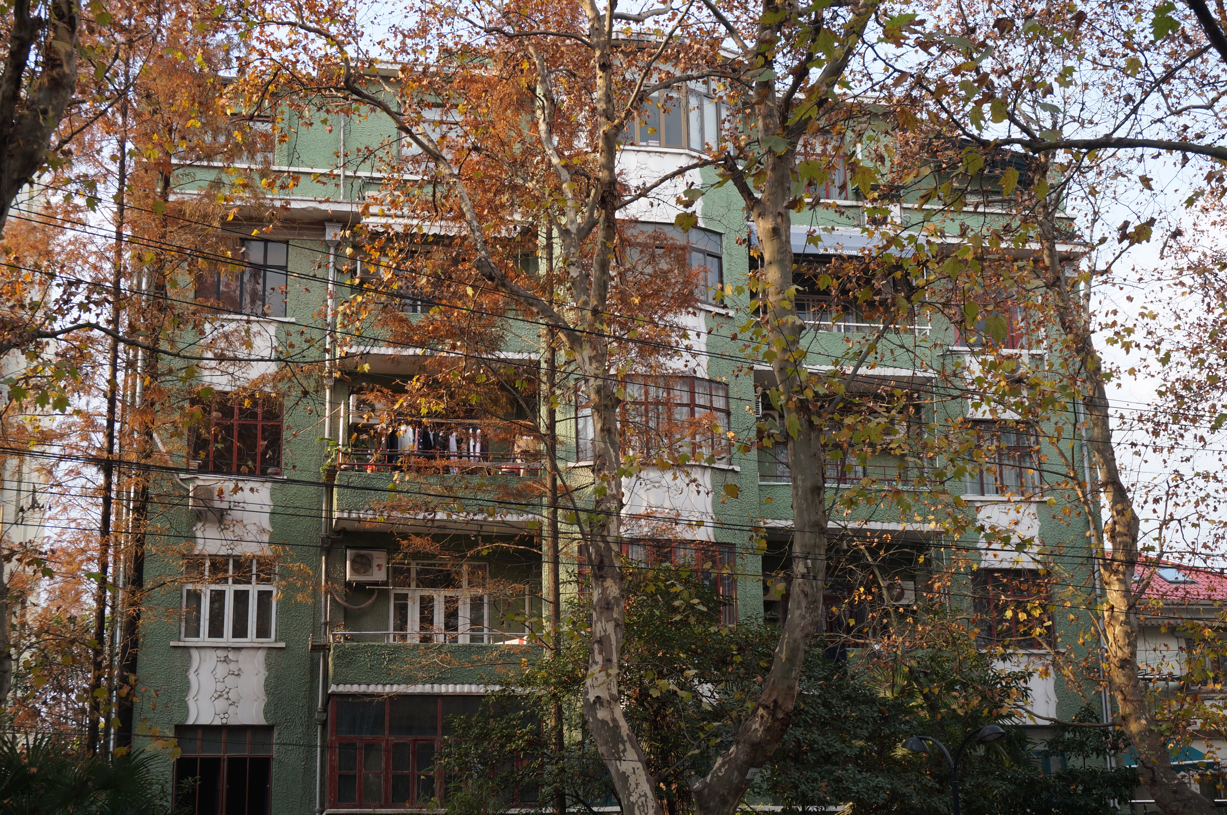 中文（中国大陆）: 上海市第四批优秀历史建筑-贝当公寓